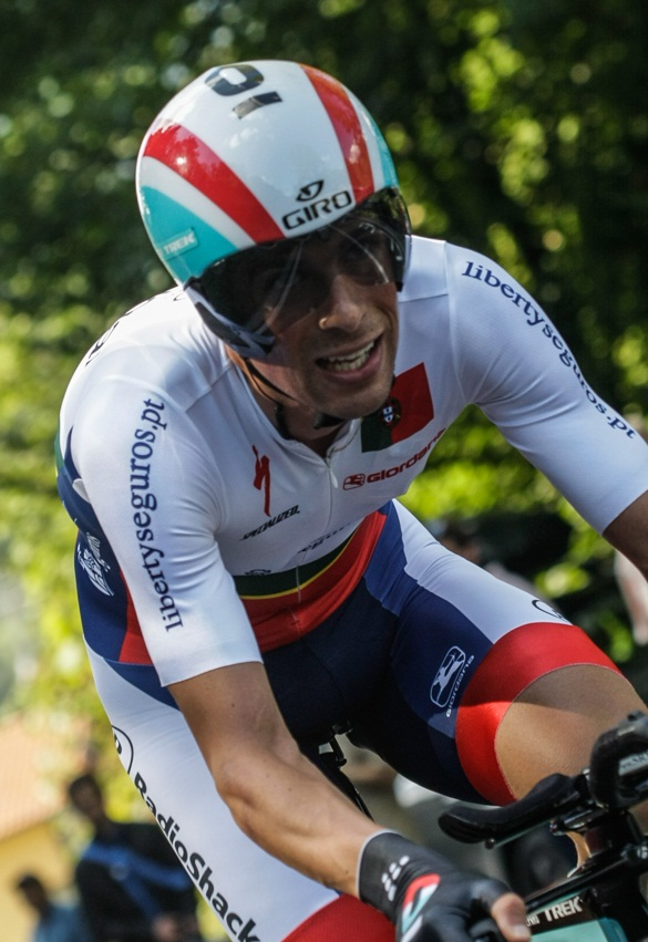 Nelson Oliveira en la Contrarreloj individual del Campeonato Mundial de Ciclismo en Ruta 2013.